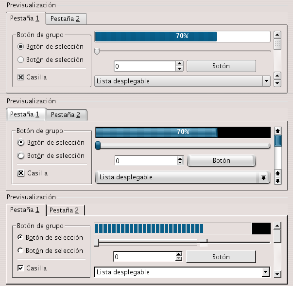 Various skins of Qt (Keramik, Plastik, and Windows)